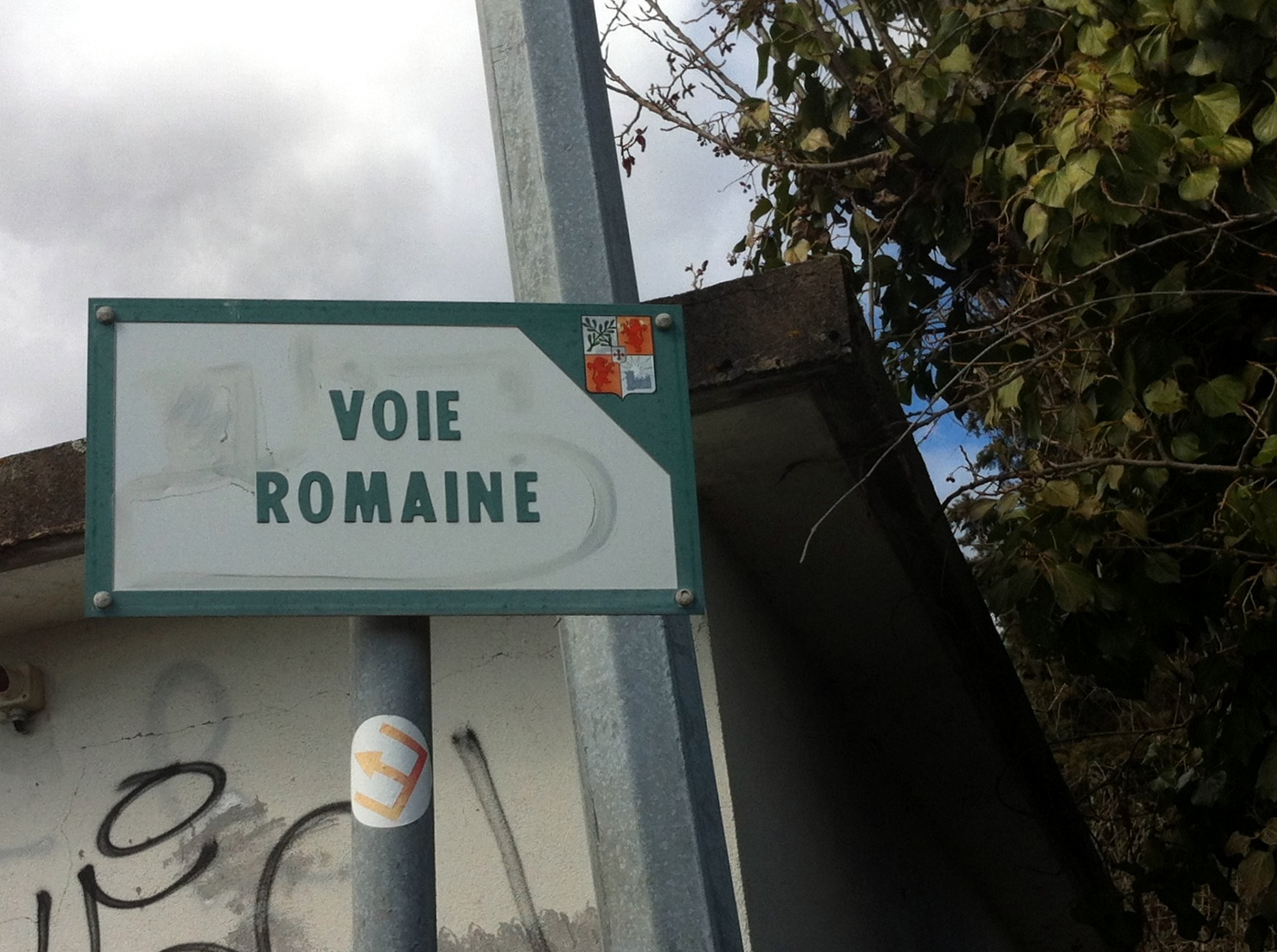 Panonceau de la Voie Romaine à Beynost.